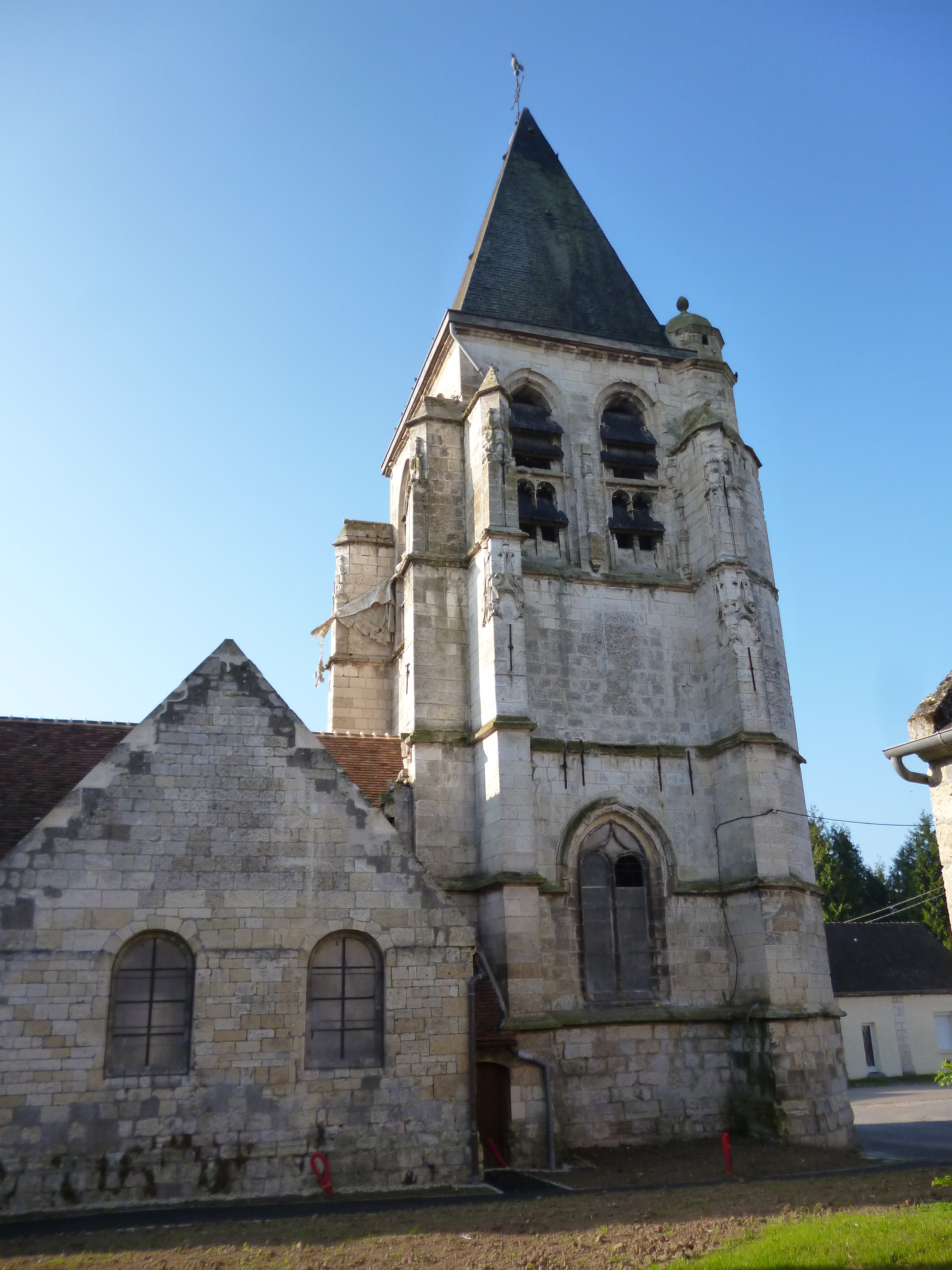 Église Saint-Éloi de Léglantiers (Oise), monument historique .